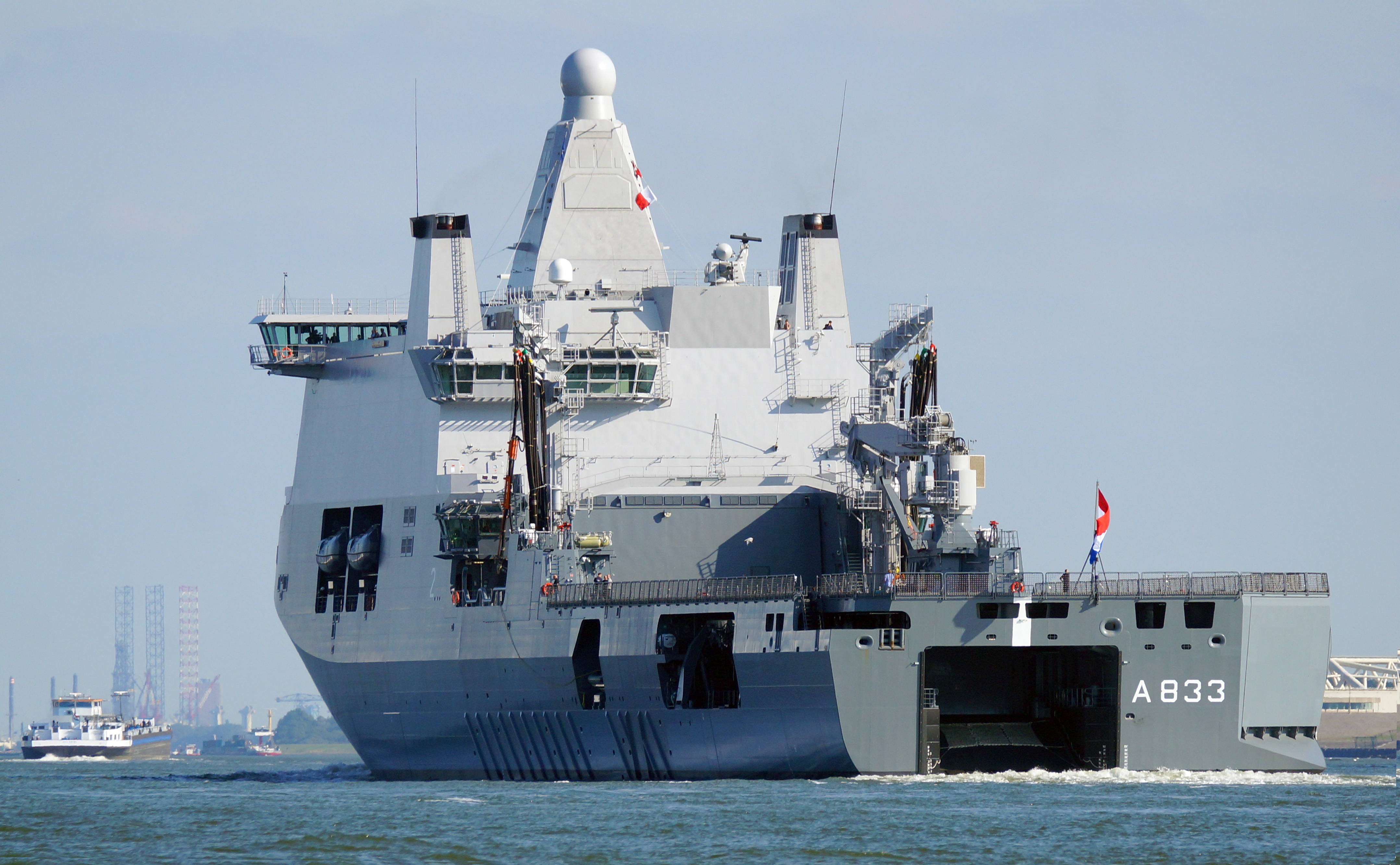 Nieuwe Waterweg 3-9-2014 . Deelnemer aan de wereldhavendagen in Rotterdam. Eerste bezoek aan Rotterdam.